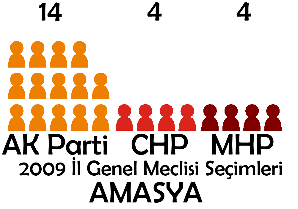 2009 Türkiye yerel seçimleri,İl genel meclisi dağılımı